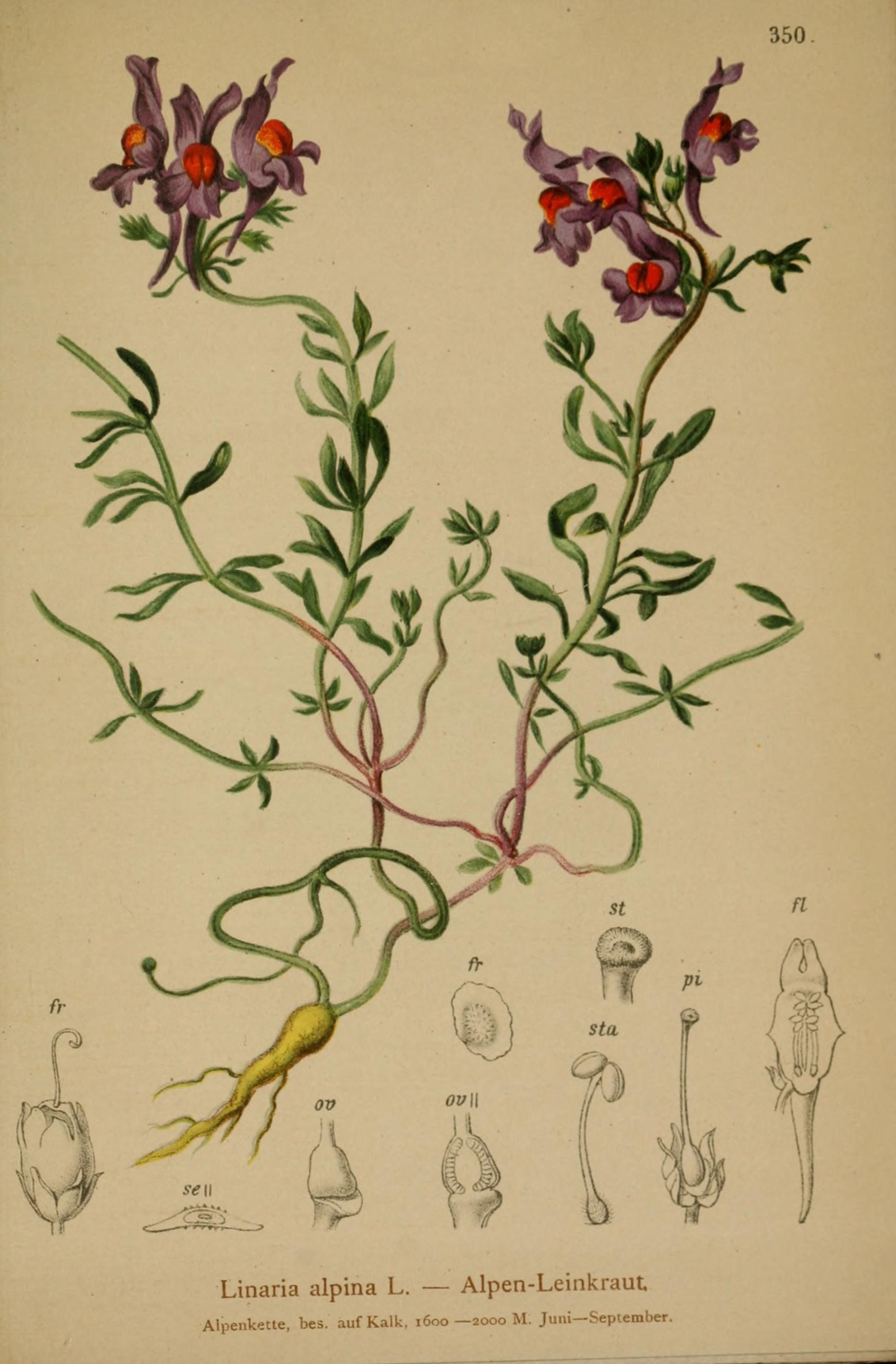 350 Linaria alpina L. — Alpen-LeinkrauC Alpenkette, bes. auf Kalk, 1600 —2000 M. Juni— Sepiember.